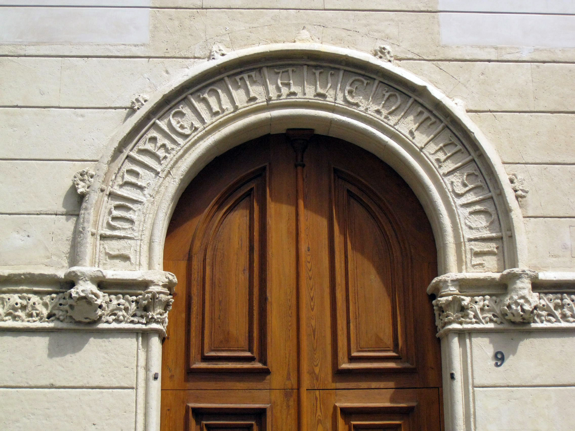 Impremta Ventayol, edifici eclèctic de Lluís Muncunill de 1895 situat a la plaça de Mossèn Jacint Verdaguer núm. 5 (Terrassa). Vista de la façana de l'antiga impremta restaurada, que ara forma part d'un edifici modern més ampli que l'anterior. Detall de l'arc del portal d'entrada.